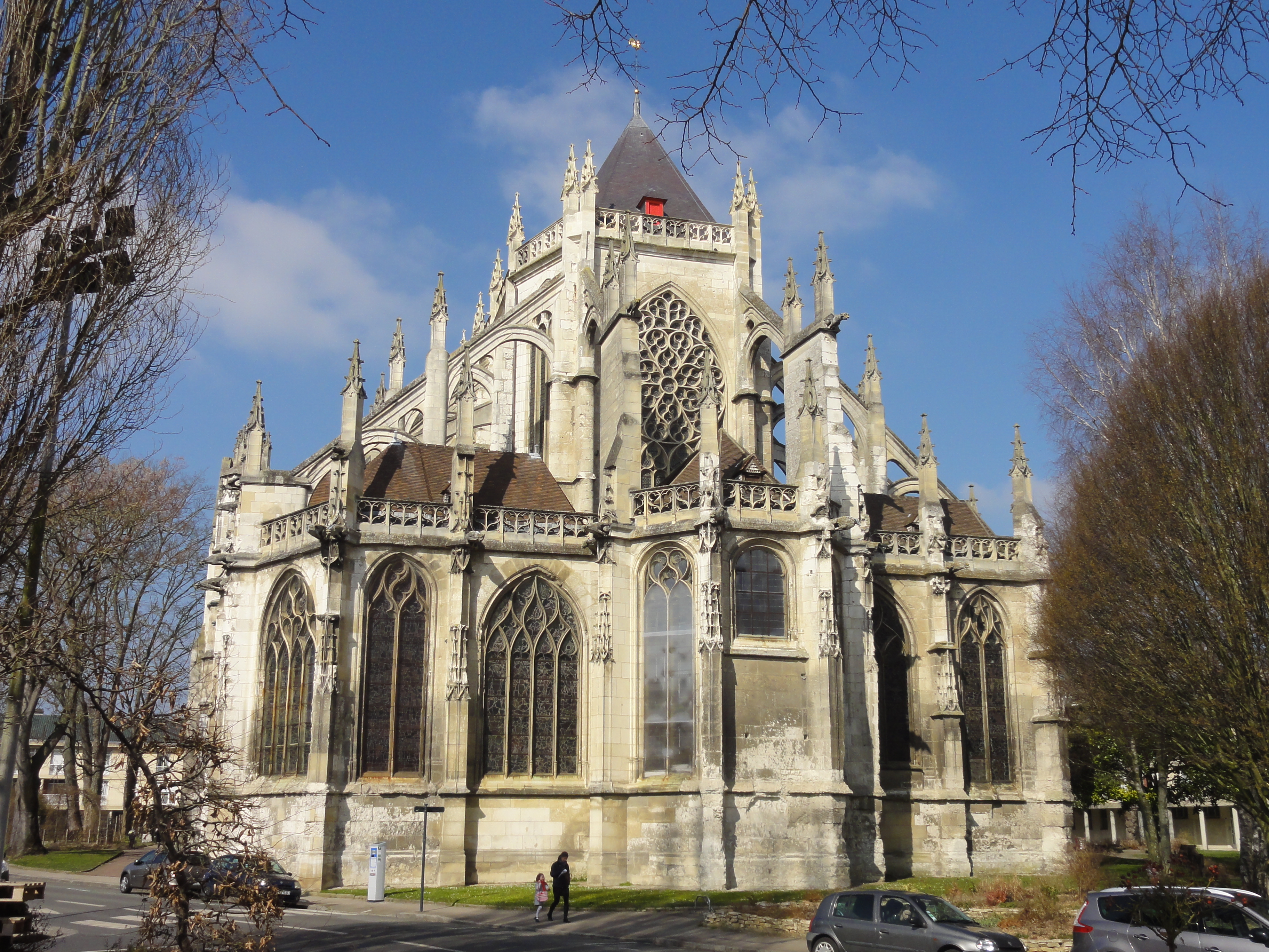 Chevet.